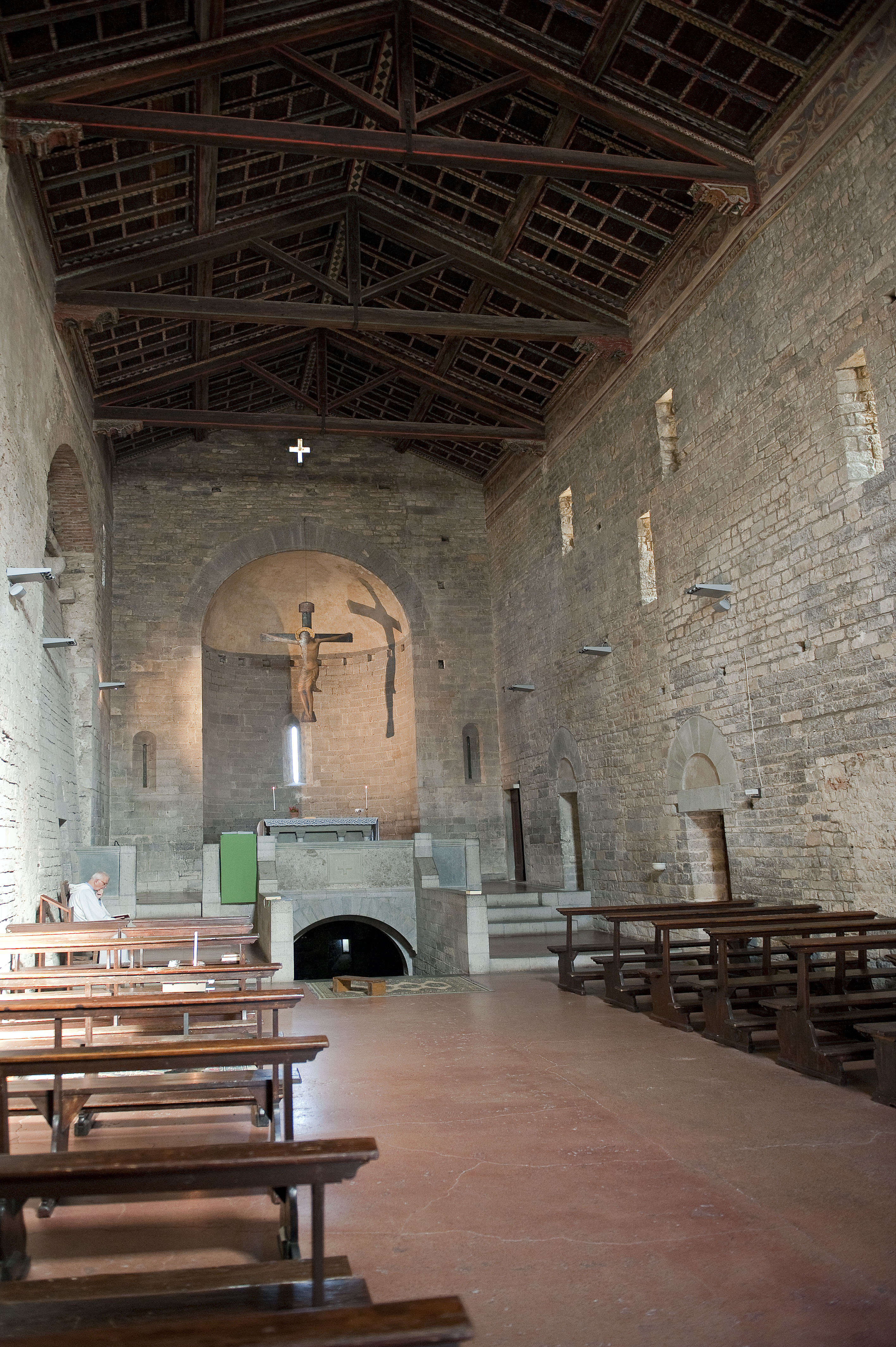 Interno della Chiesa di Sant'Andrea a Mosciano- Scandicci